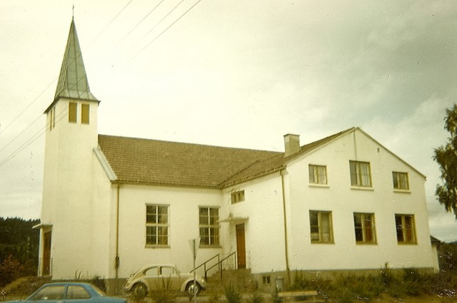 Lierskogen bedehuskapell